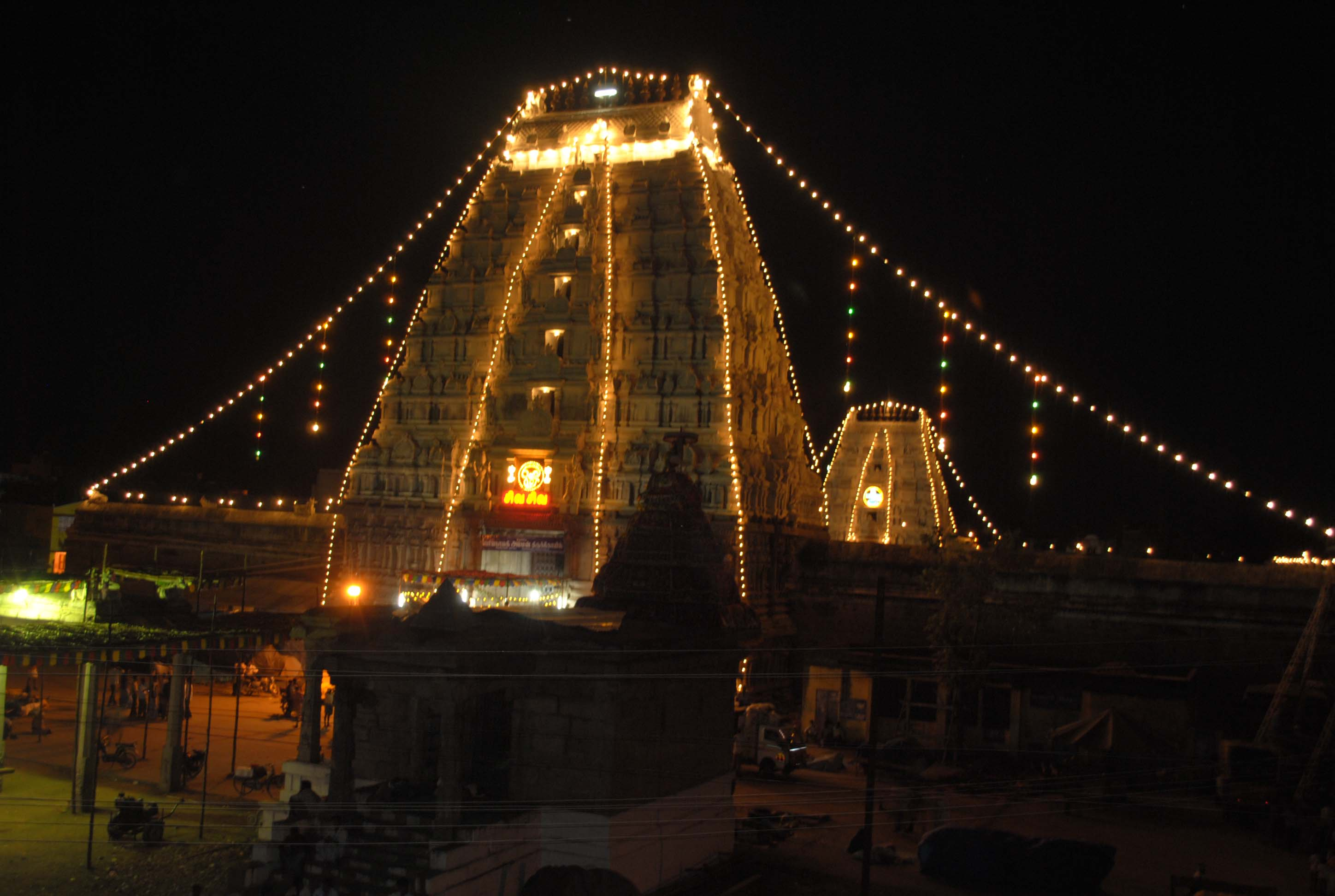 தேவிகாபுரம் திருவிழாவின் போது பெரியநாயகி அம்மன் கோயில்